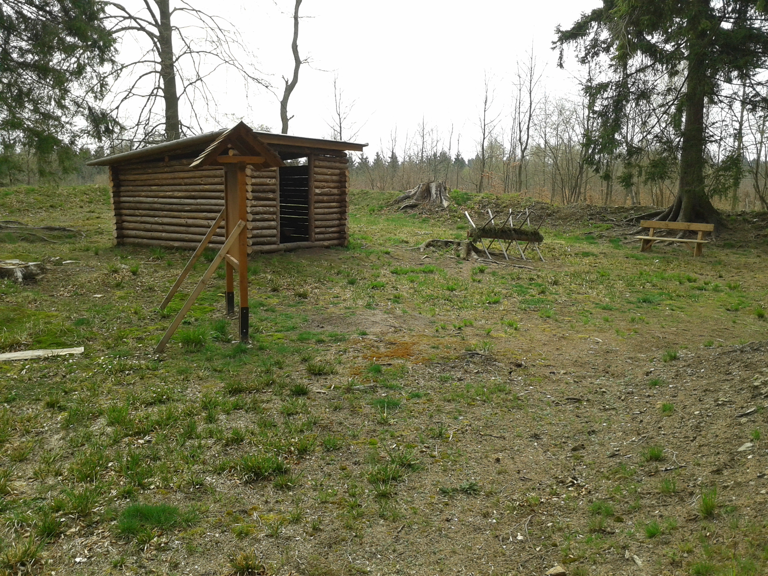 Freilichtmuseum auf der Selkenfelder Schanze